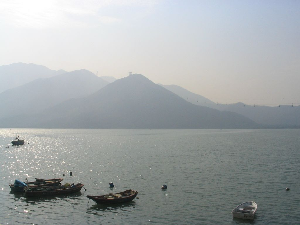 東涌灣 Tung Chung Bay